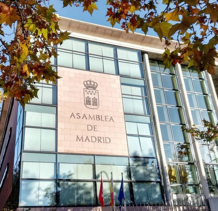 Ekstero de la Asembleo de Madrido